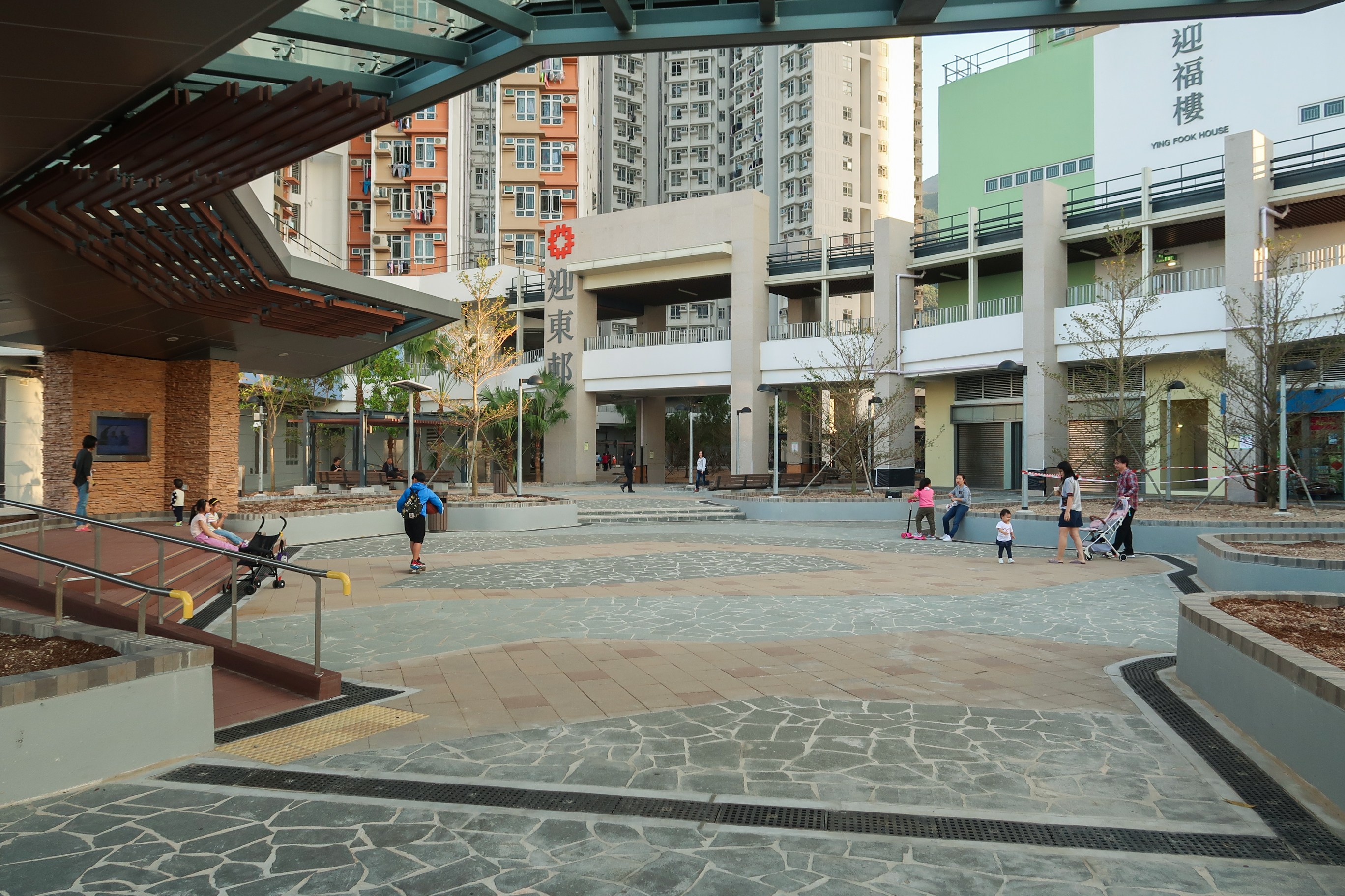 Ying Tung Estate Entry Plaza